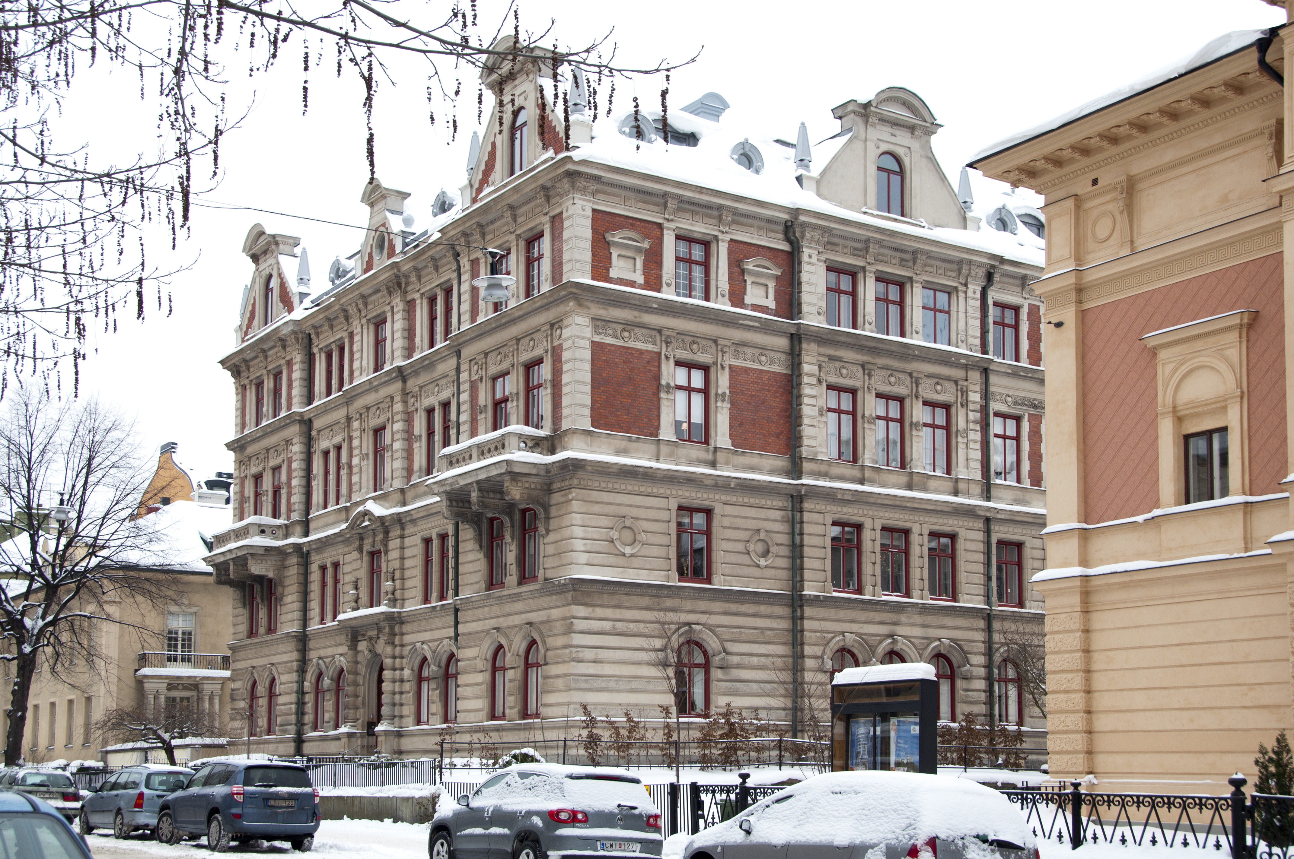 Wallenbergska huset, Villagatan 4. Från 1904 bebott av den Wallenbergska släkten. Byggnadsår 1887-88, arkitekter Axel & Hjalmar Kumlien byggherre O Ekman, byggmästare Ankarstrand & Nyström